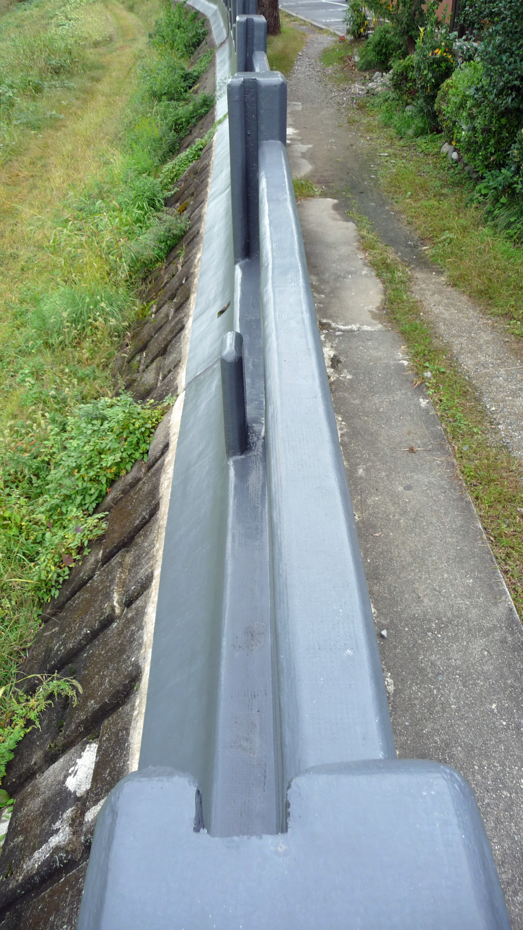 兵庫県たつの市内の揖保川沿いにある畳堤